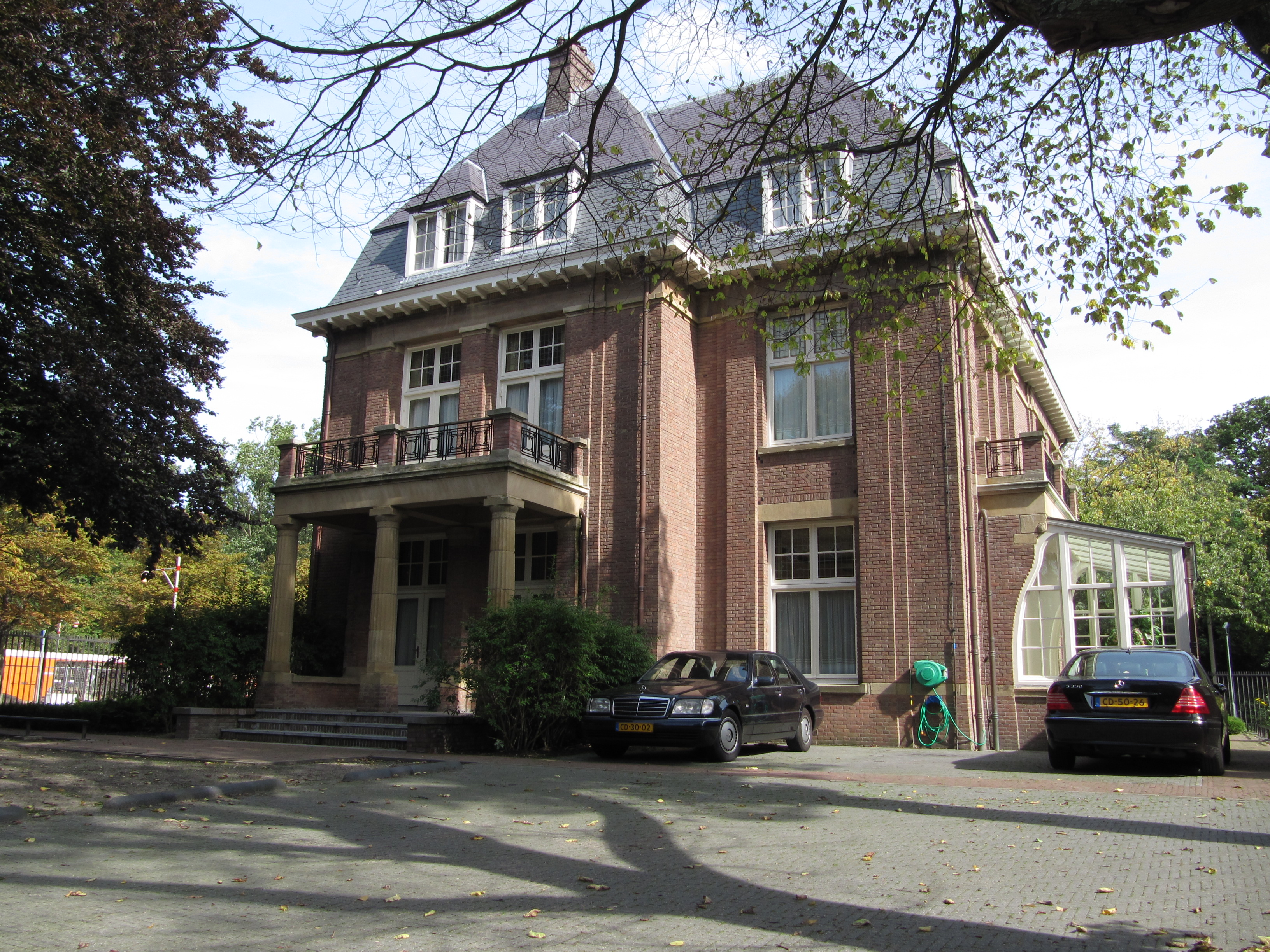 RM487574 Den Haag - Alexander Gogelweg 2.jpg